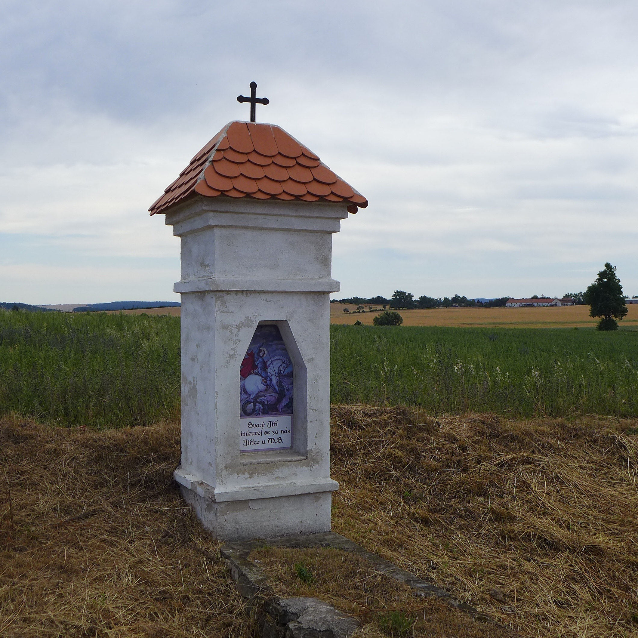 Boží muka, při silnici k Hostimi, Jiřice u Moravských Budějovic.